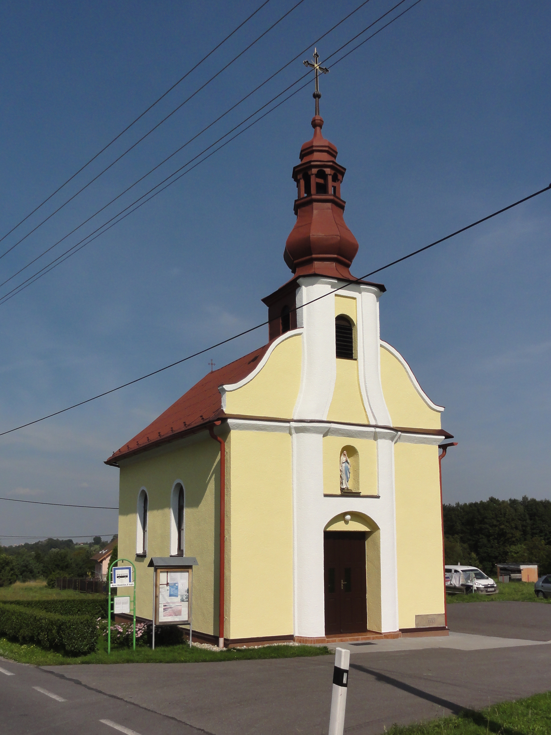 Kaplica św. Jana Nepomucena z 1930 r.